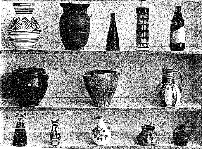 כלים מתוצרת חברת "לפיד". תצלום מתוך: מה חדש בממלכת הכלים של "חרסה" "ולפיד", דבר, 23 באוקטובר 1959